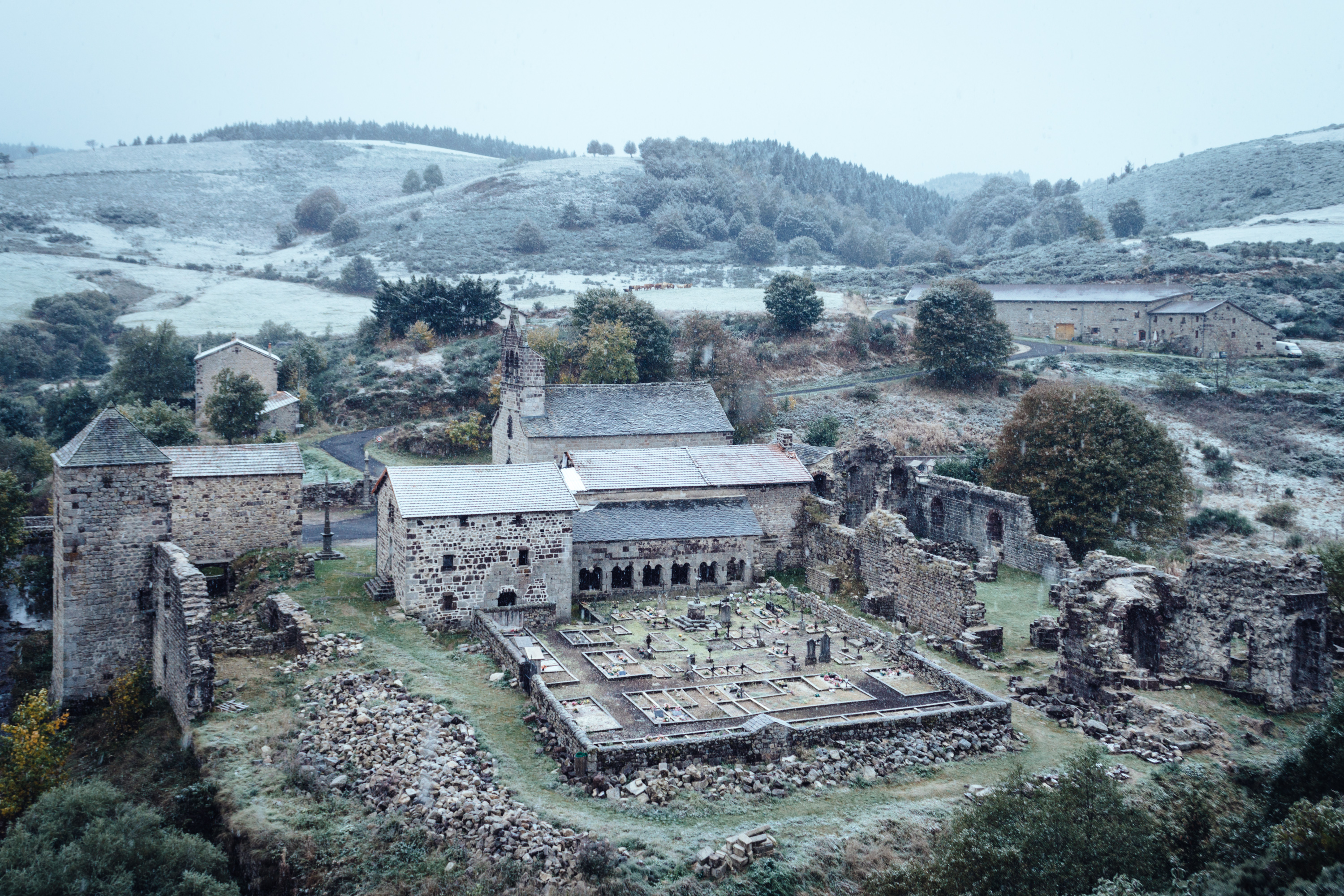 Ruines de l'Abbaye de Mazan sous la neige. Prise le 12 octobre 2013, à Mazan-l'Abbaye, France.